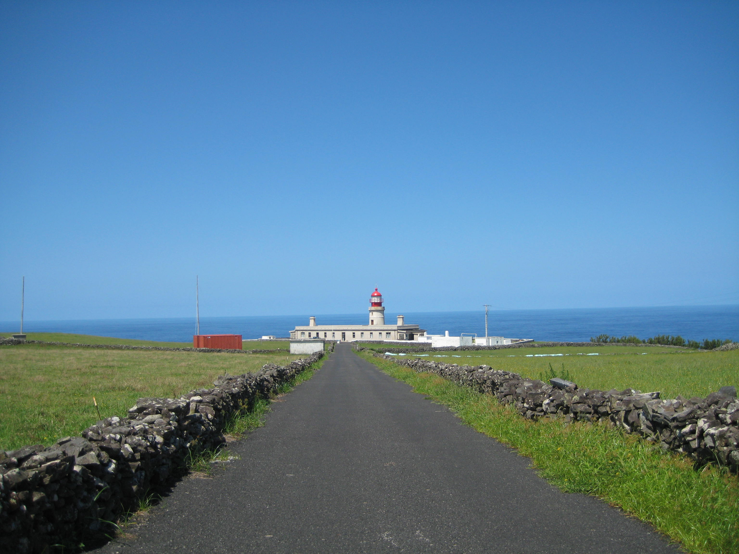 Farol Albernaz